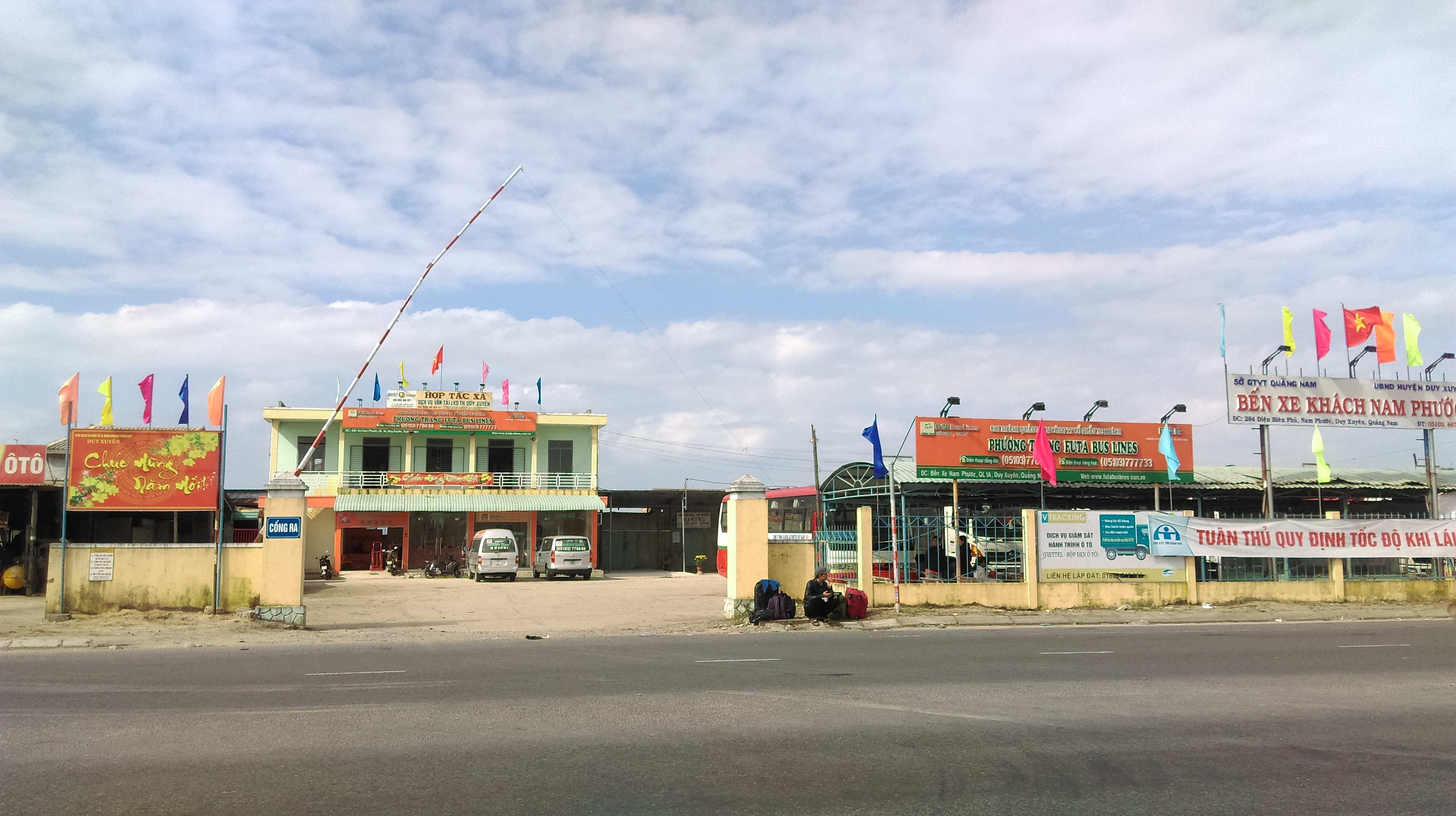 Bến xe Khách Nam Phước, Duy Xuyên, Quảng Nam